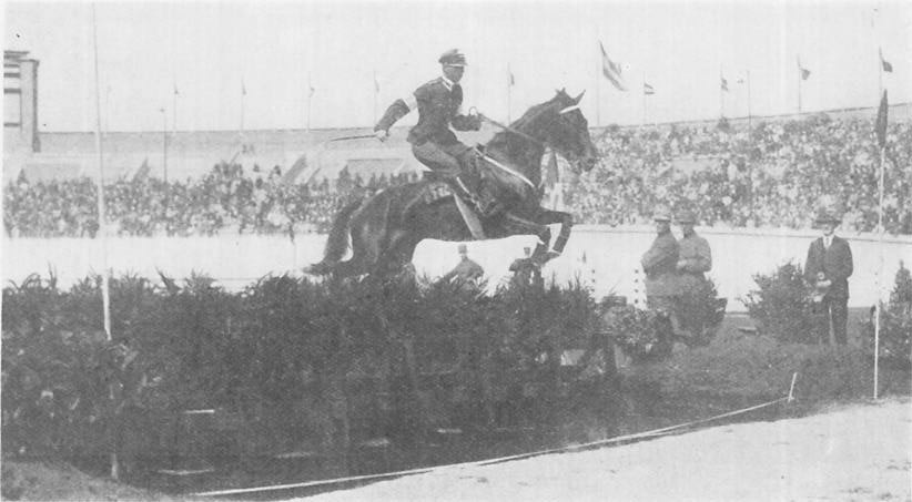 Le cavalier polonais J. Trenkwald sur Lwi Pazur aux jeux olympiques d'Amsterdam en 1928.